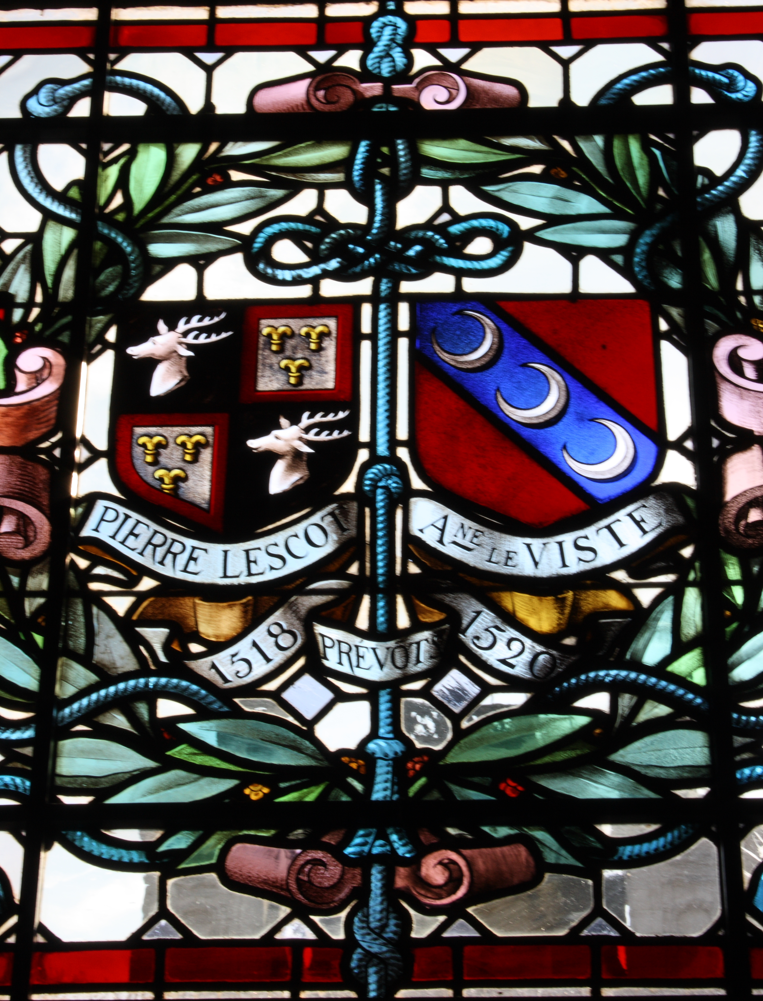 Bleiglasfenster im Rathaus von Paris (4. Arrondissement), "galerie du conseil", Darstellung: Wappen der Prévôt des marchands de Paris